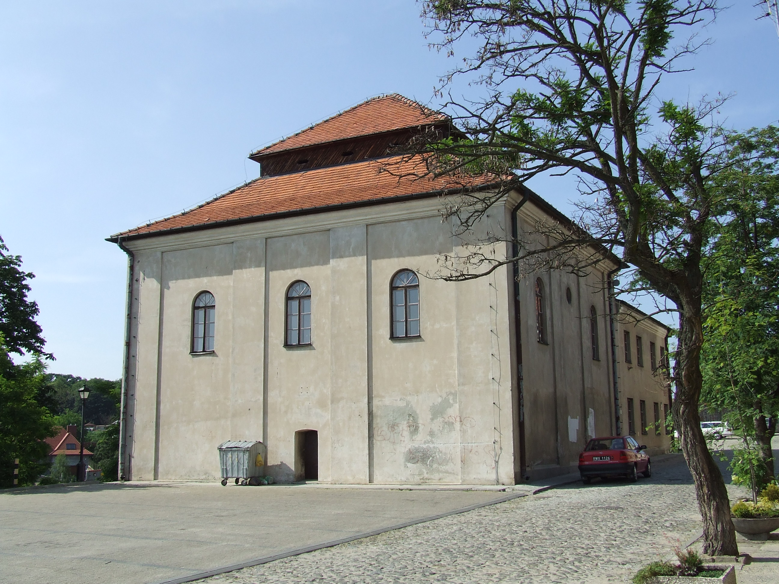 Synagogue in Sandomierz, Poland, 1768